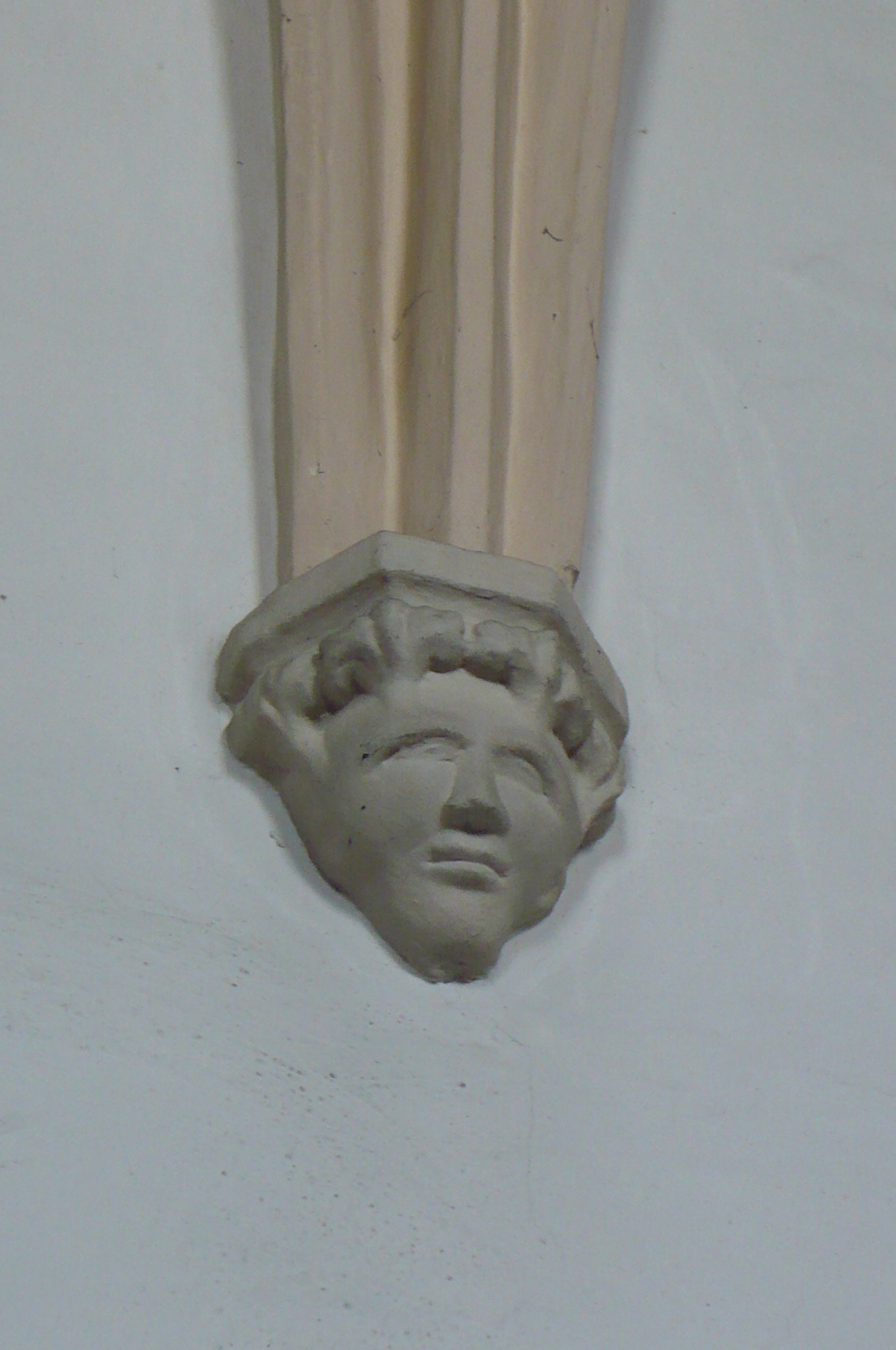 maskarón